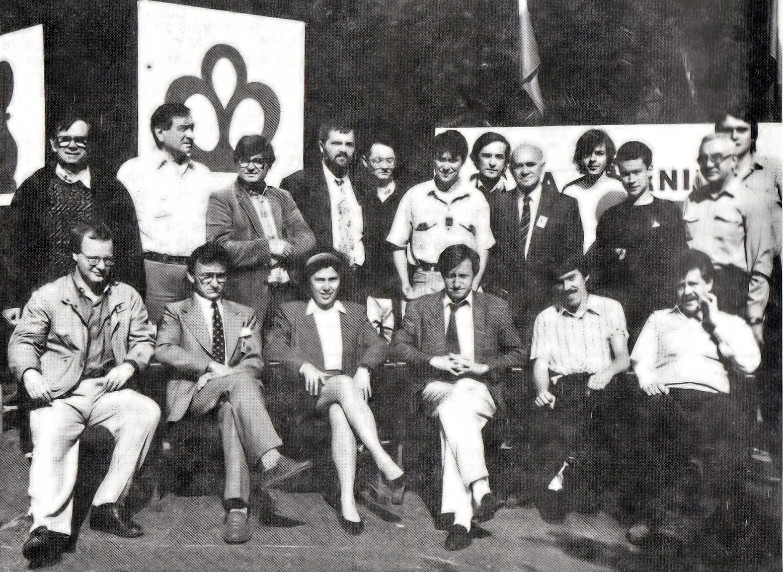 Uczestnicy XXVIII Memoriału Akiby Rubinsteina, Polanica-Zdrój 3-15 września 1991. Stoją od lewej: am J.Smejkal, rzecznik prasowy mm S.Witkowski, redaktor biuletynu U.Jahr, am A.Wojtkiewicz, mm R.Kuczyński, mm J.Gdański, am S.Dołmatow, dyrektor turnieju i sędzia główny mm A.Filipowicz, sekundant J.Lautiera mf E.Birmingham, am J.Lautier, prezes OZSzach Wrocław R.Więckowski i am R.Lau. Siedzą od lewej: mm E.Schmittdiel, sędzia Cz.Szmigielski, am Z.Polgar, am O.Romaniszyn, mm R.Mainka i am A.Adorjan.